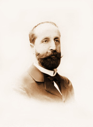 Blai Maria Colomer i Pérez